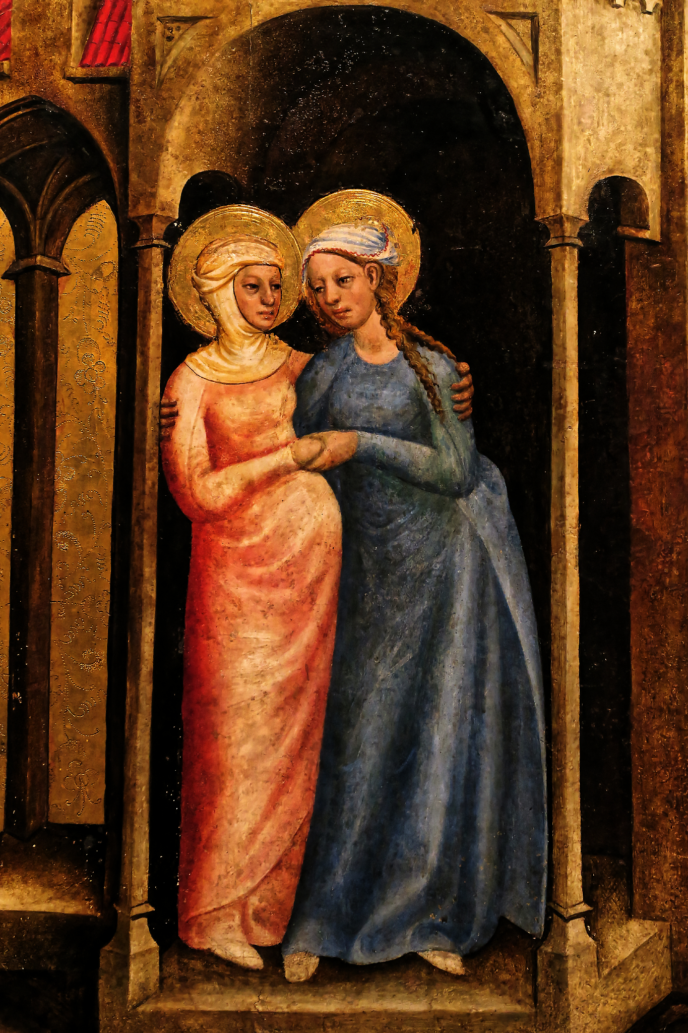 Altar von Schloss Tirol: Detailszene vom Altar von Tirol, der gerade restauriert wird